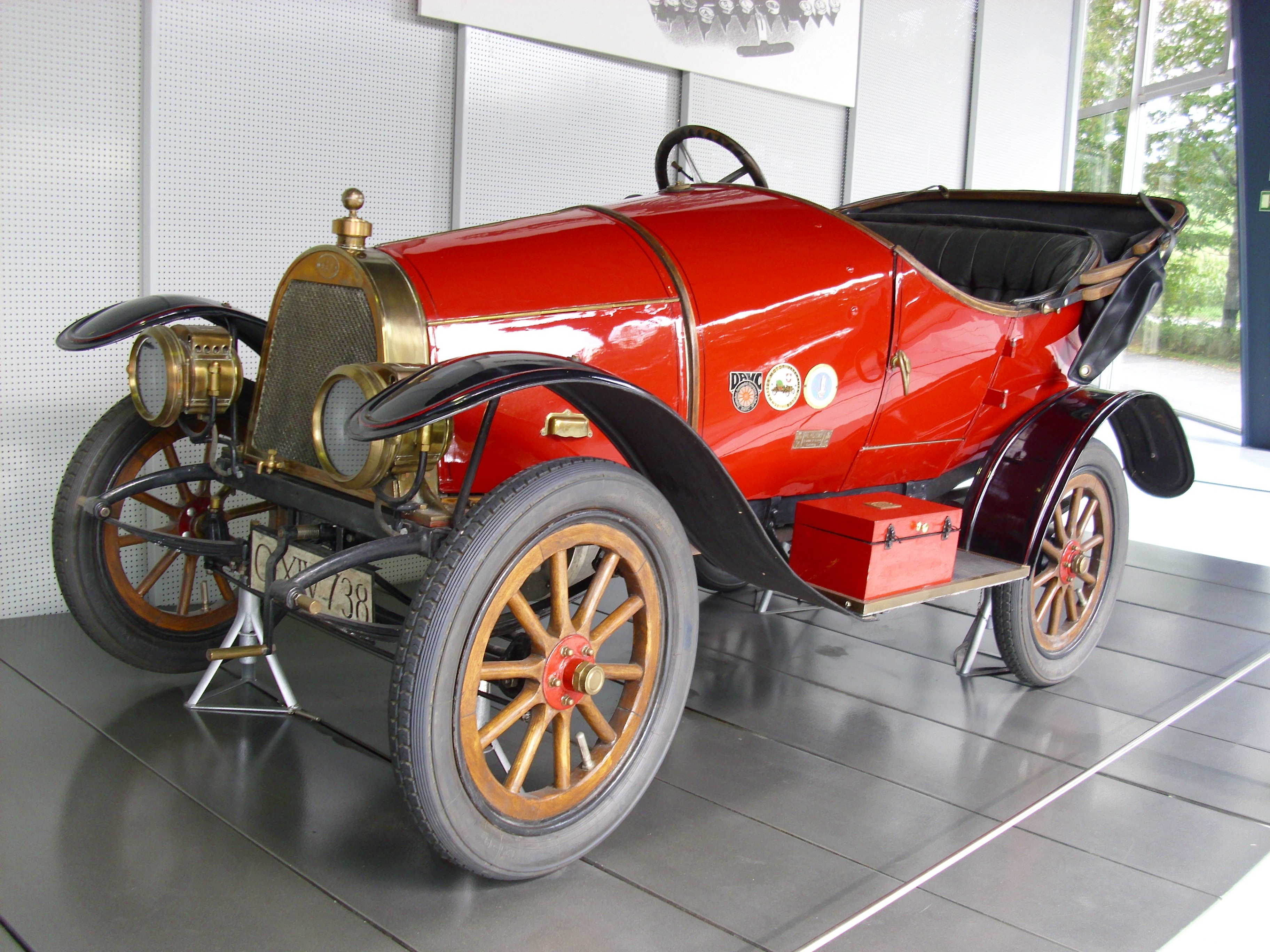 KAN 1911-1915